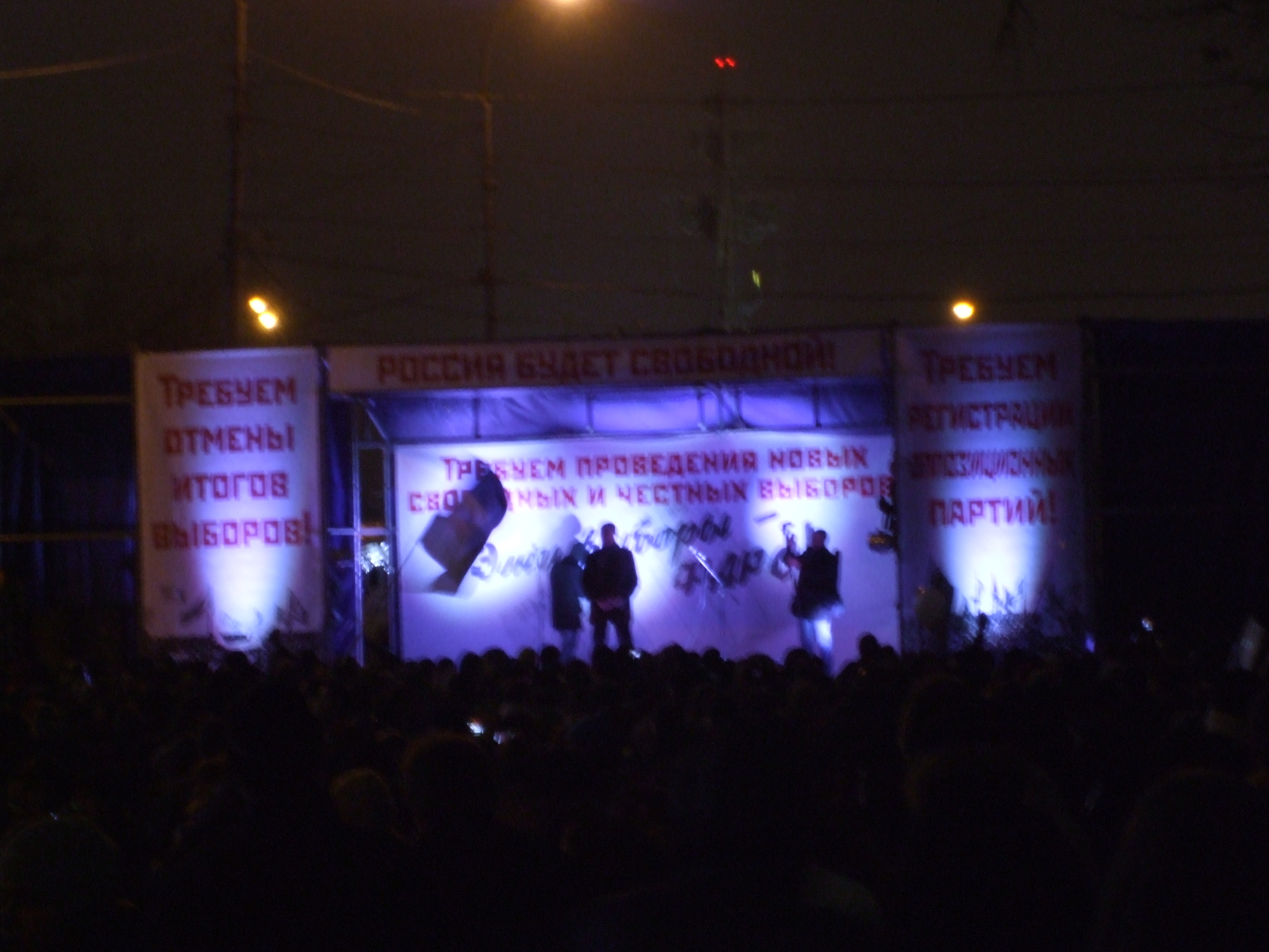 Конец митинга на Болотной площади 10 декабря 2011